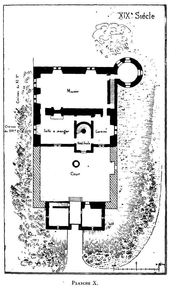 Le Donjon de Courmenant, ses origines, ses seigneurs et possesseurs, son musée